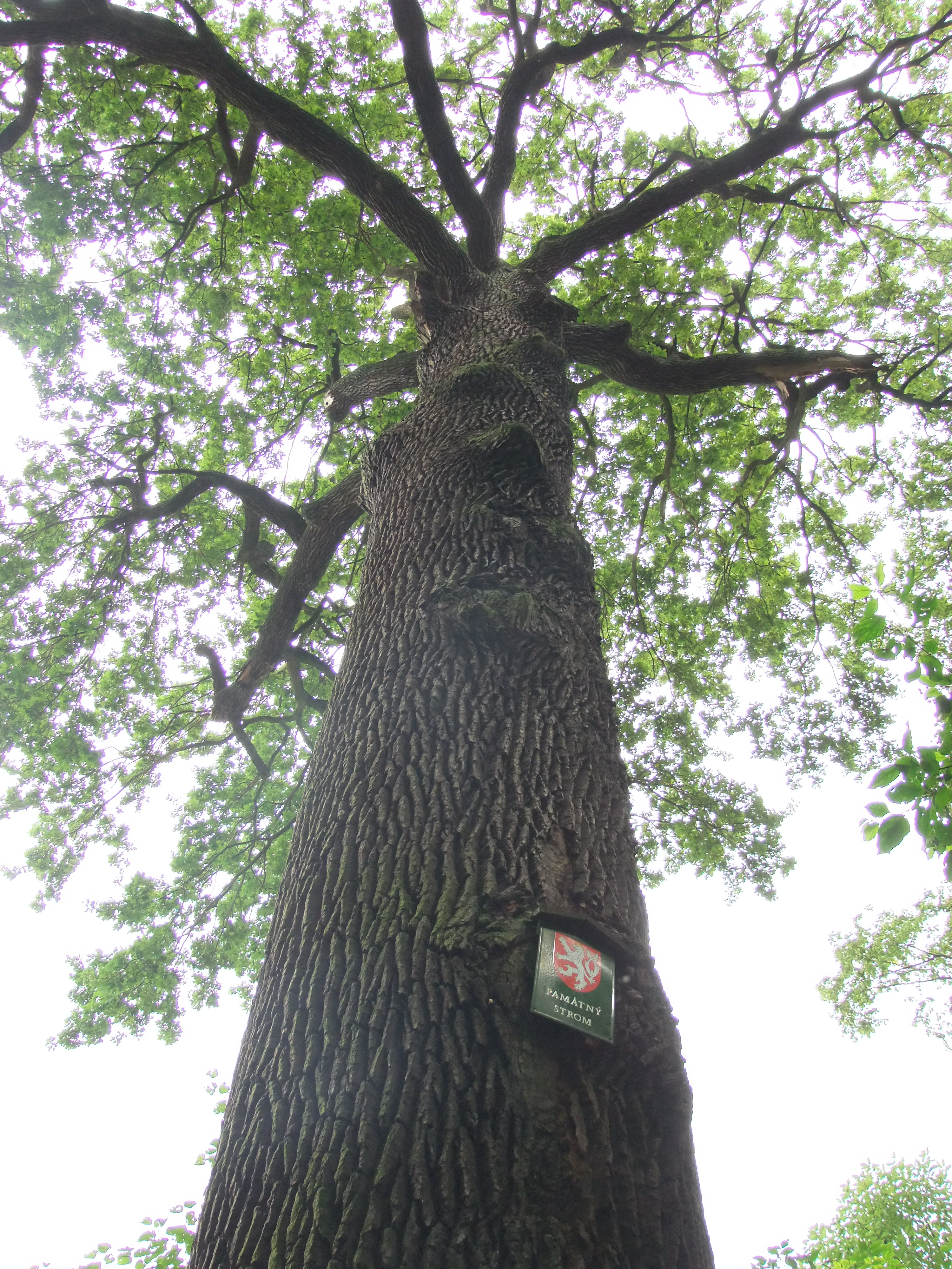 Dub Král (2016)